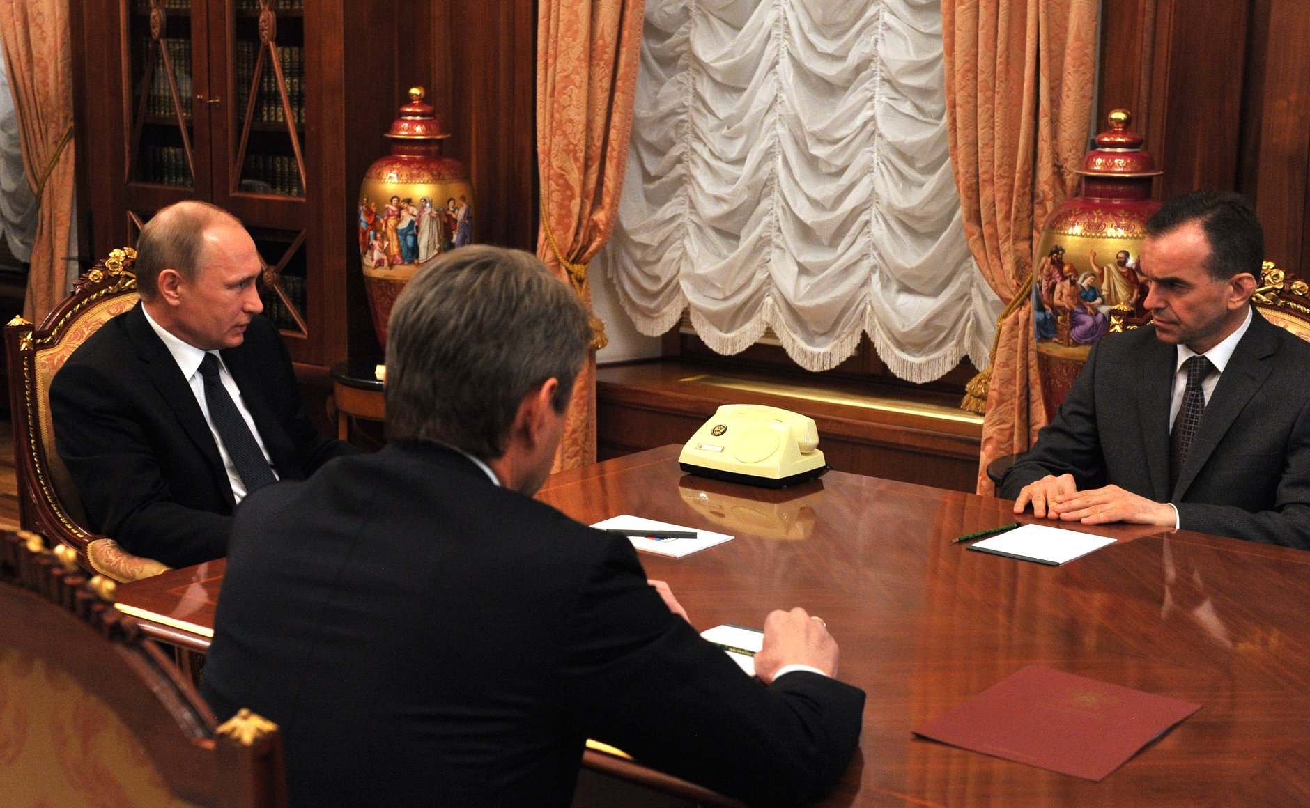 Рабочая встреча Владимира Путина с Александром Ткачёвым и Вениамином Кондратьевым